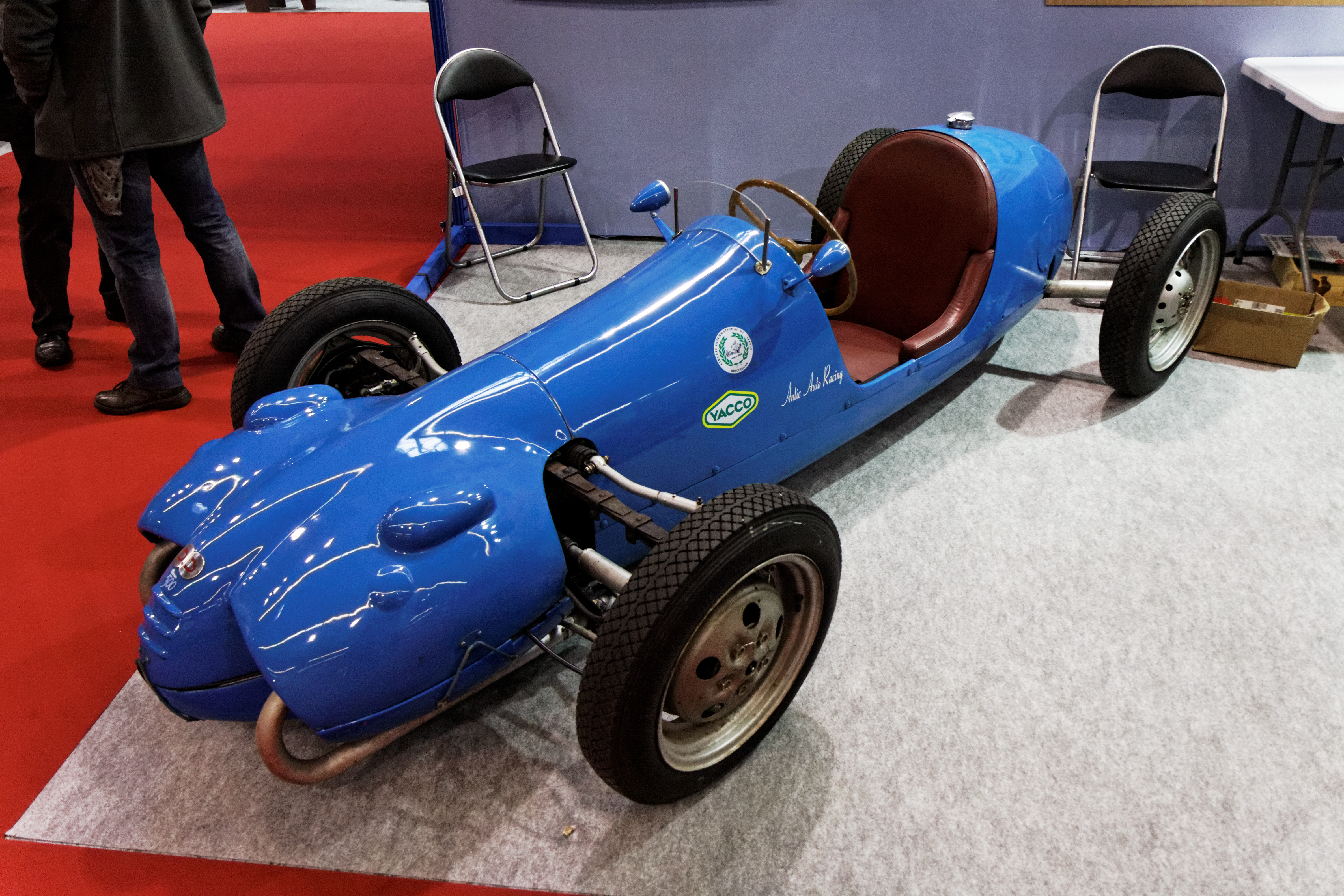 Une DB Racer 500 présentée lors du salon Retromobile 2013.